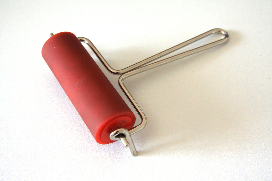 Rouleau à encre utilisable pour linogravure ou monotype.